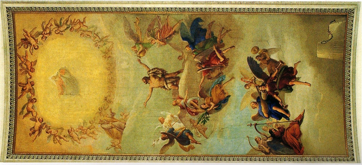 fotografia navata chiesa di bessica.Foto personale.Bessica 2006